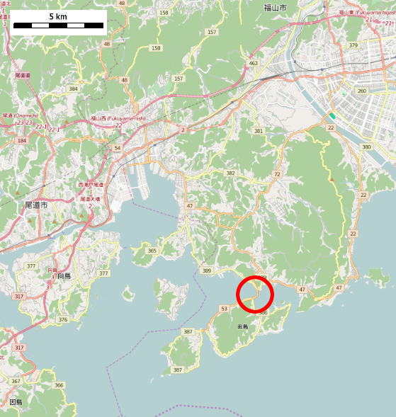 広島県福山市内海町の内海大橋周辺 This map may be incomplete, and may contain errors. Don't rely solely on it for navigation.